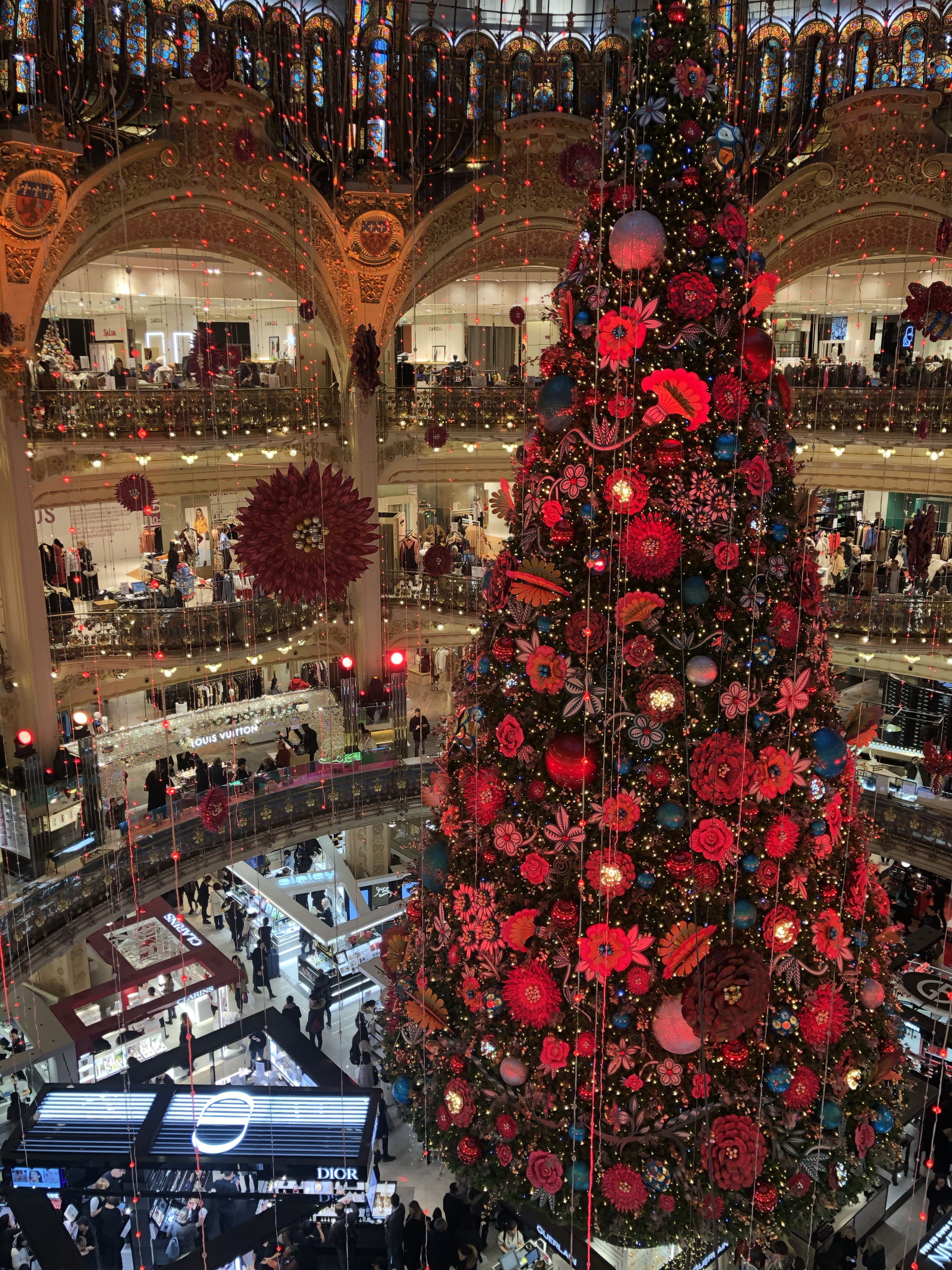 Galeries Lafayette her yıl tarihi binasının içini dev bir yılbaşı çamıyla süsler. Buradaki de 2019 yılında yapılmış olan süslemelere ait bir görseldir.